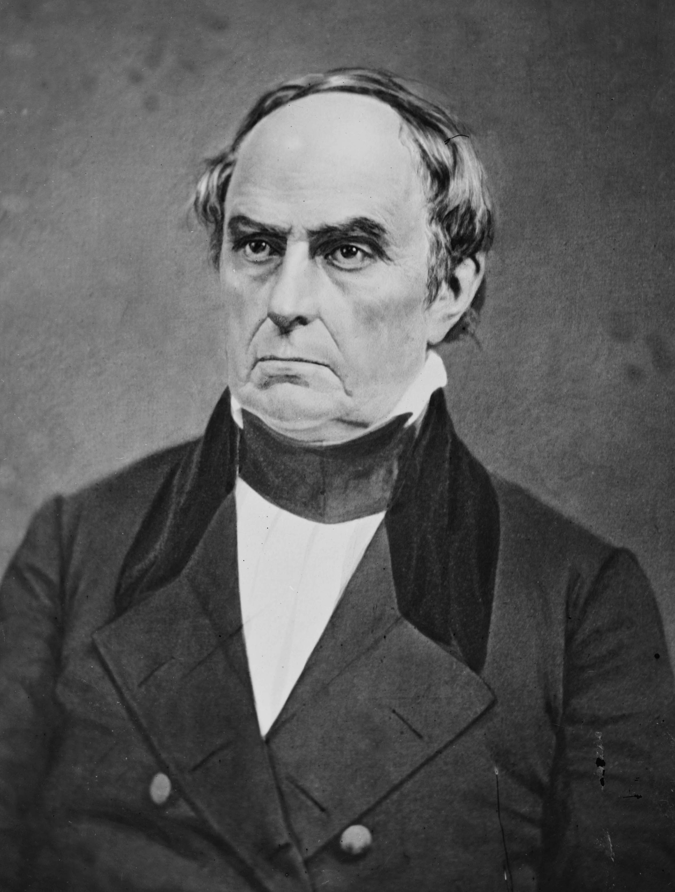 Daniel Webster (1782-1852), US-american politician / US-amerikanischer Politiker